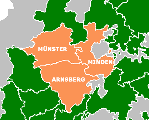 Regierungsbezirke in Westfalen 1878